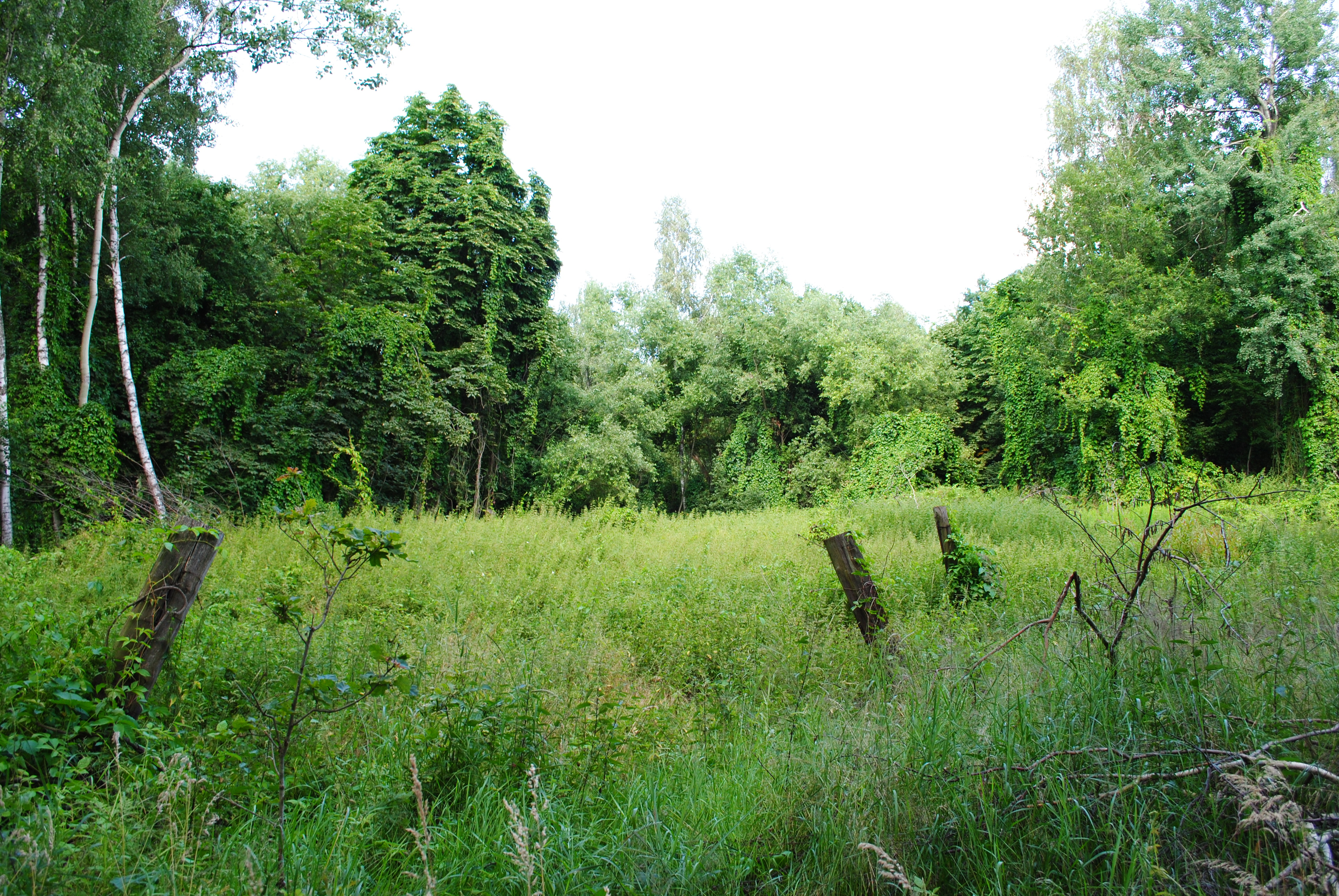 Katowice - Janów-Nikiszowiec. Las w okolicach dawnej Kolonii Amandy